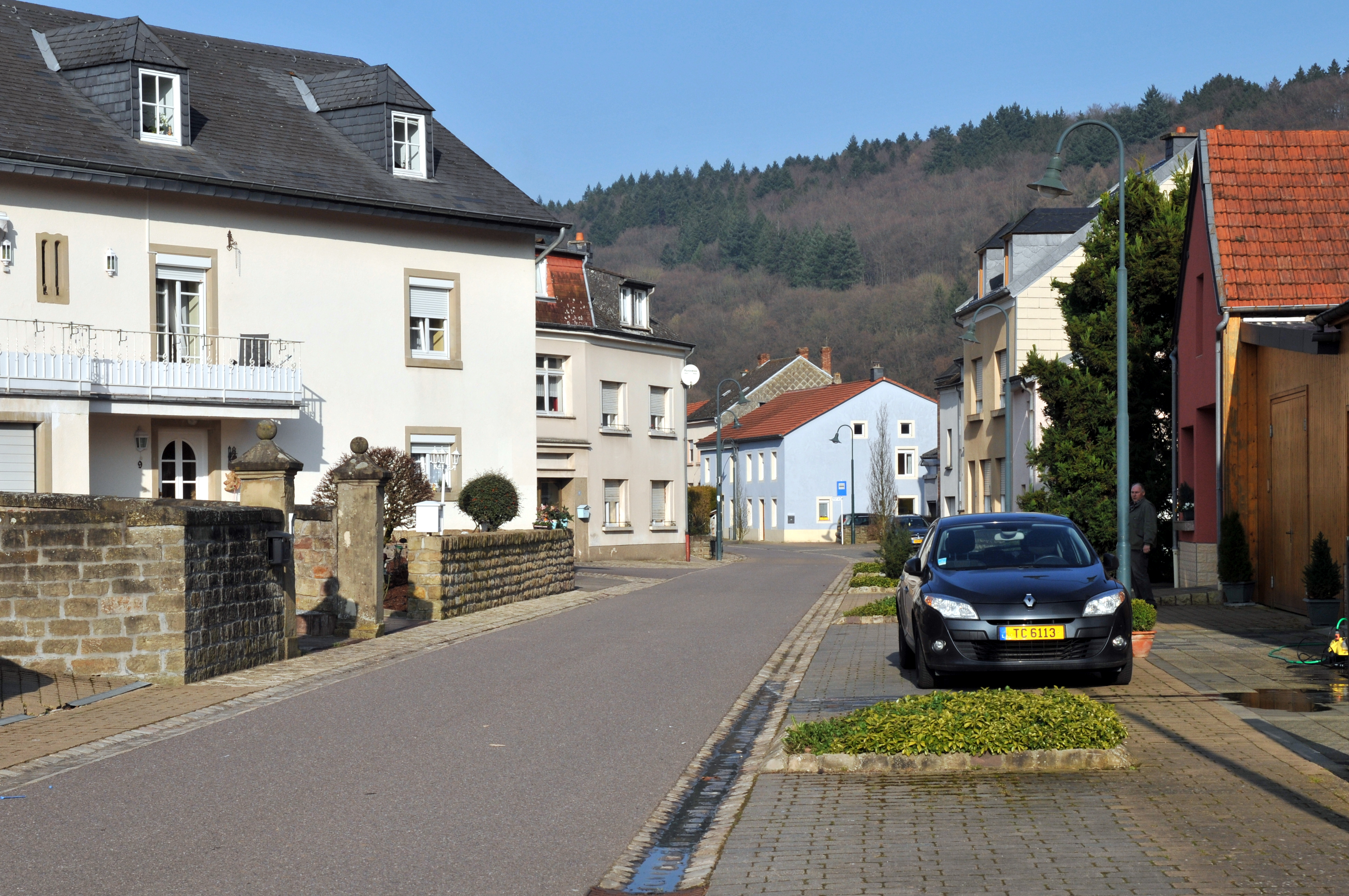 D'Duerfstrooss zu Bur.